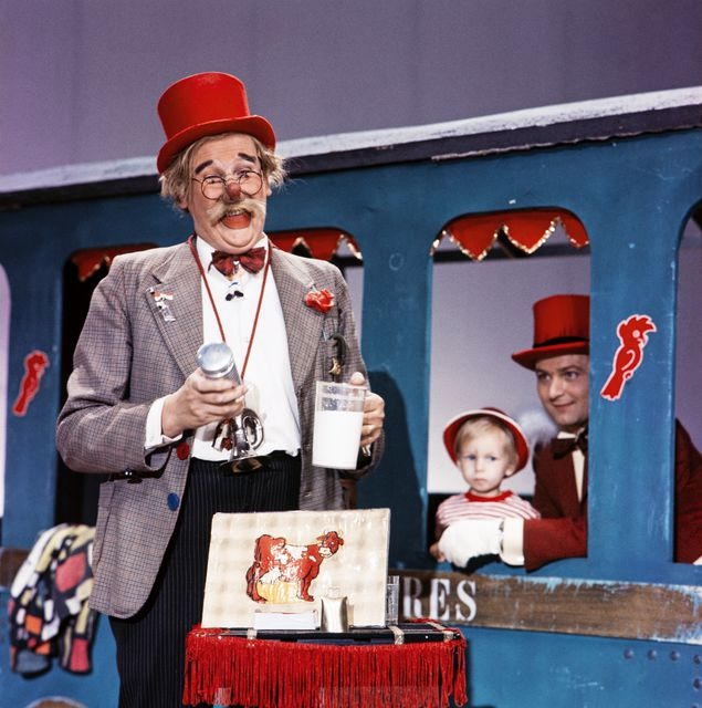 Yleisradion Sirkus Papukaija-televisiosarjasta tuttu taikurihahmo Fakiiri Kronbolm (Nils Hedengren). Tirehtööri Orvo Kontio kurkistaa ikkunasta.